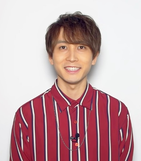 中島ヨシキ（声優） 『沼落ち5秒前! -声優編第17回-』0:48辺りのスクリーンショット（色調補正あり）